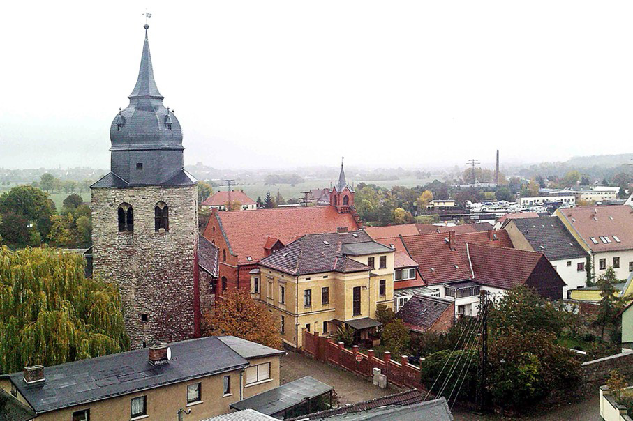 Blick aus Feuerwehr-Schlauchturm zur Stadtkirche St.Cäcilie, im Hintergrund Schiffswerft und Mukrena